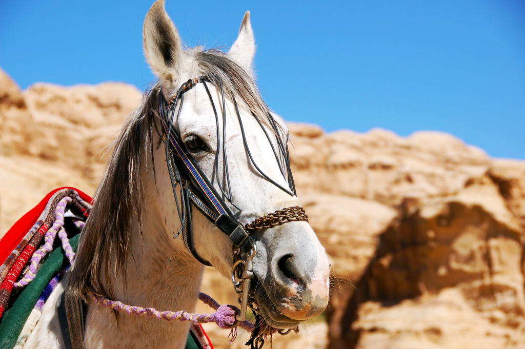 Horse in Jordania